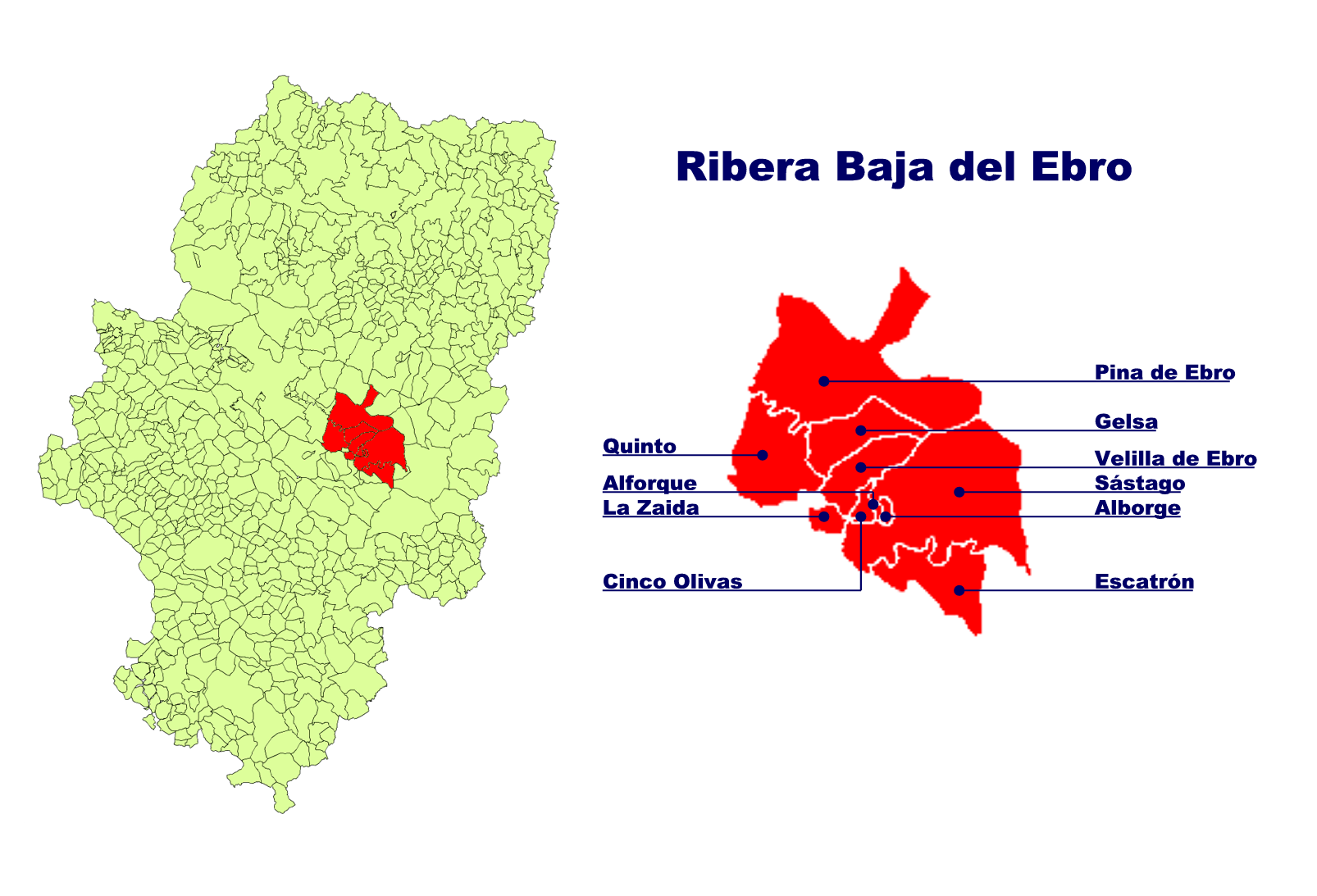 Comarca de la Ribera Baja del Ebro Creado el 03.10.2005 por Ecelan en base a Image:Aragon municipalities.png